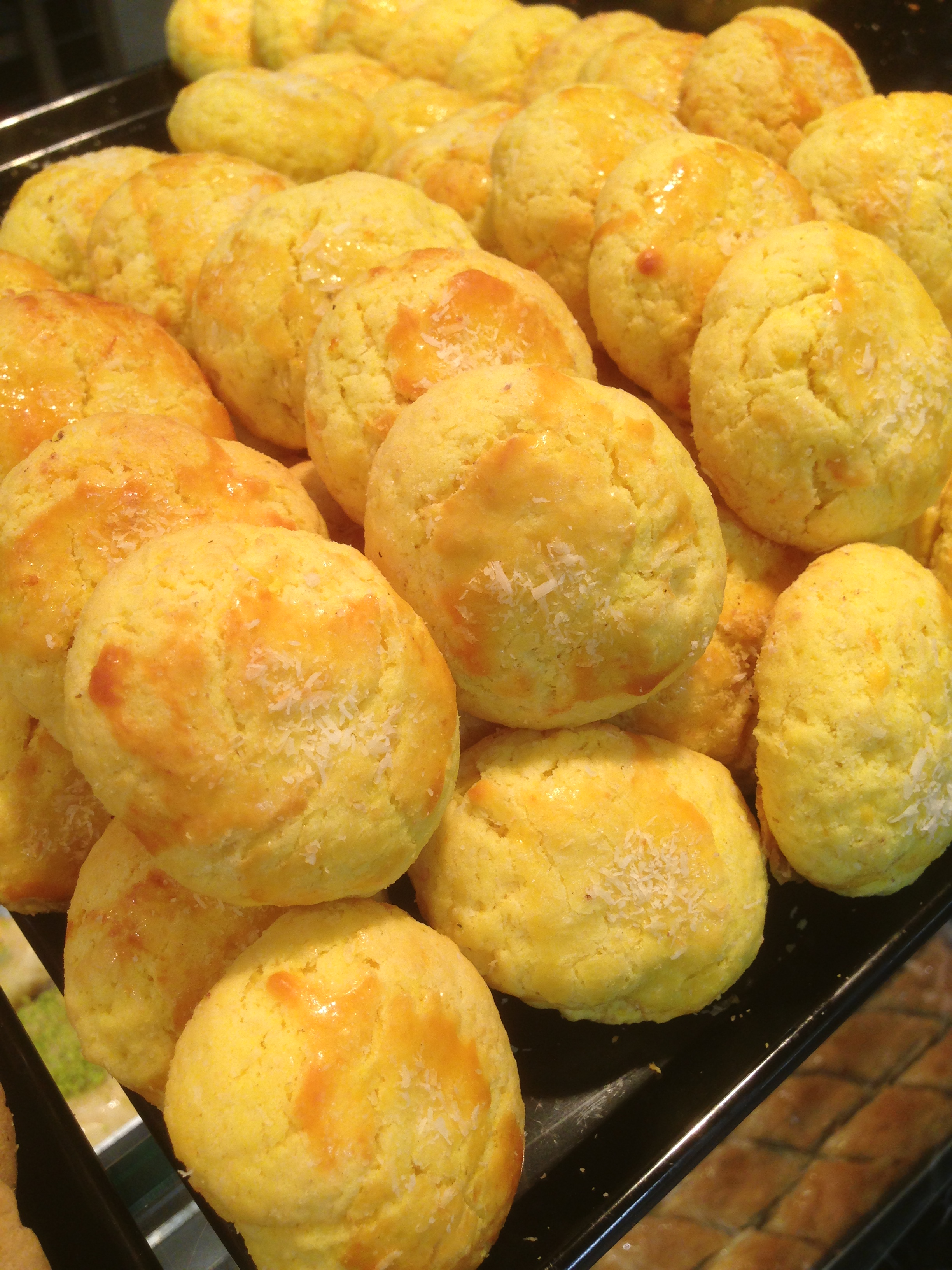 hamur işi tatlılardan görüntüler